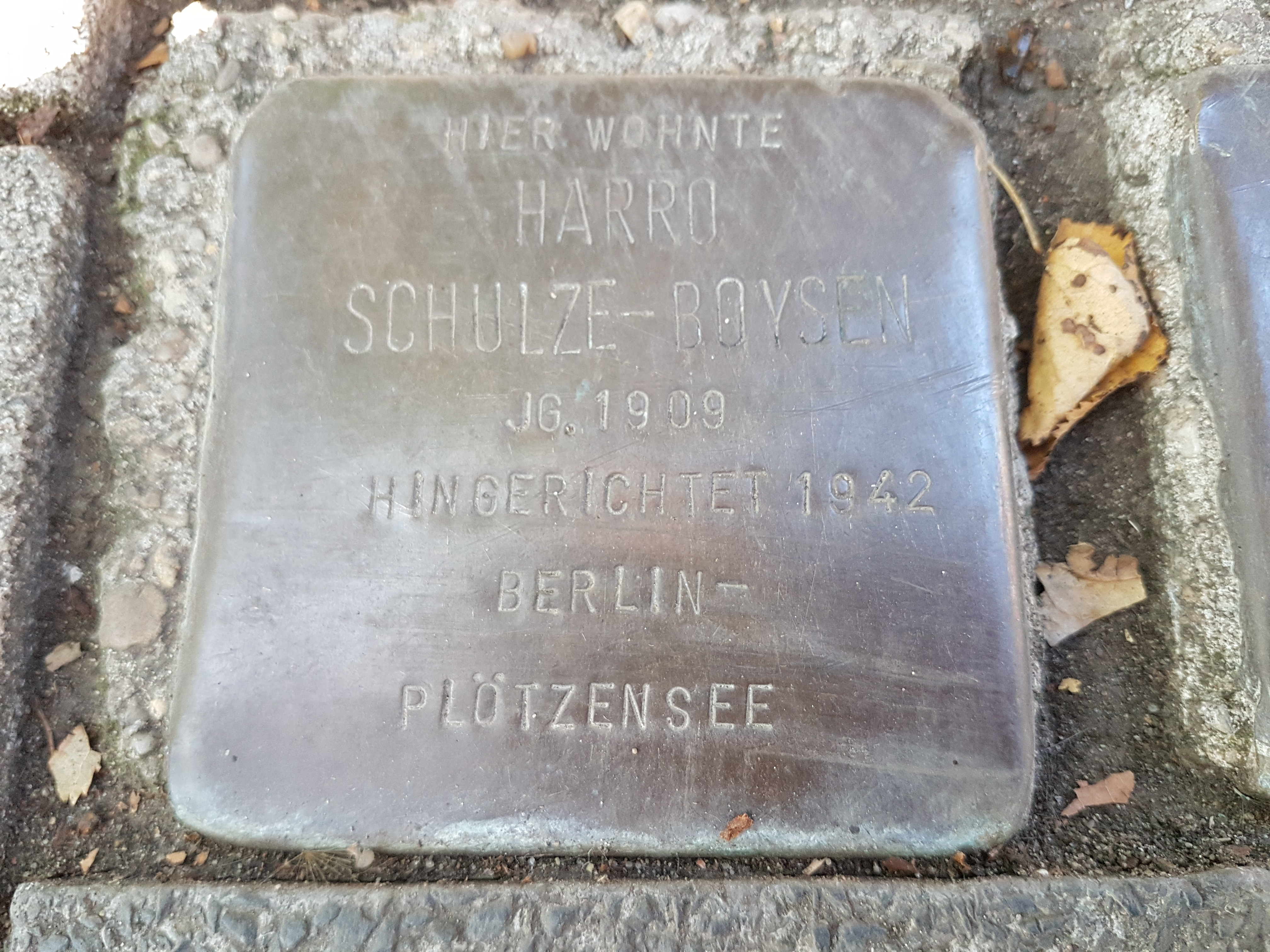 Stolperstein Duisburg Harro Schulze-Boysen